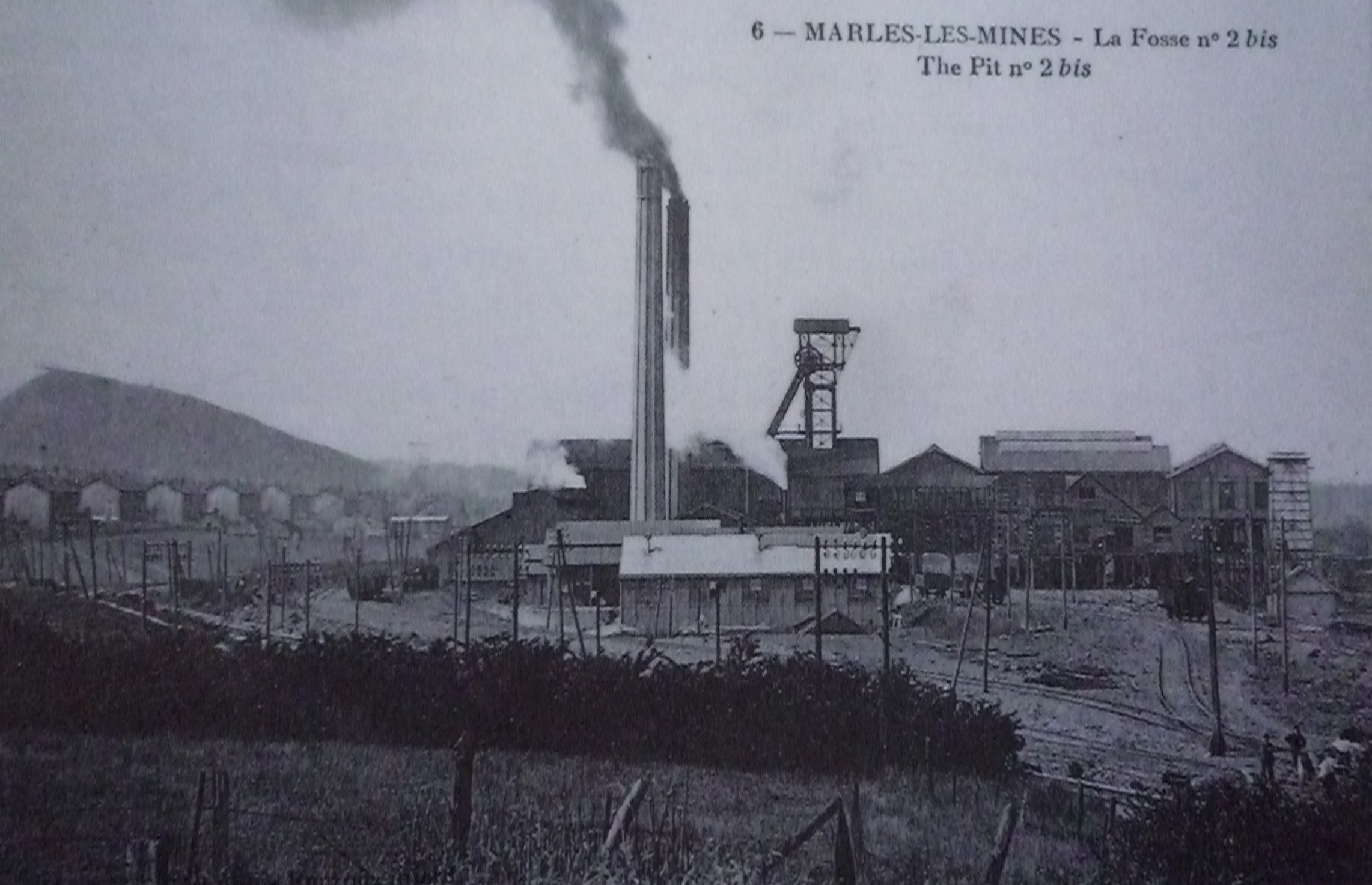 La Fosse n° 2 bis - 2 ter de la Compagnie des mines de Marles était un charbonnage constitué de deux puits situé à Marles-les-Mines, Pas-de-Calais, Nord-Pas-de-Calais, France. La fosse n° 2 se trouvait sur un autre carreau.